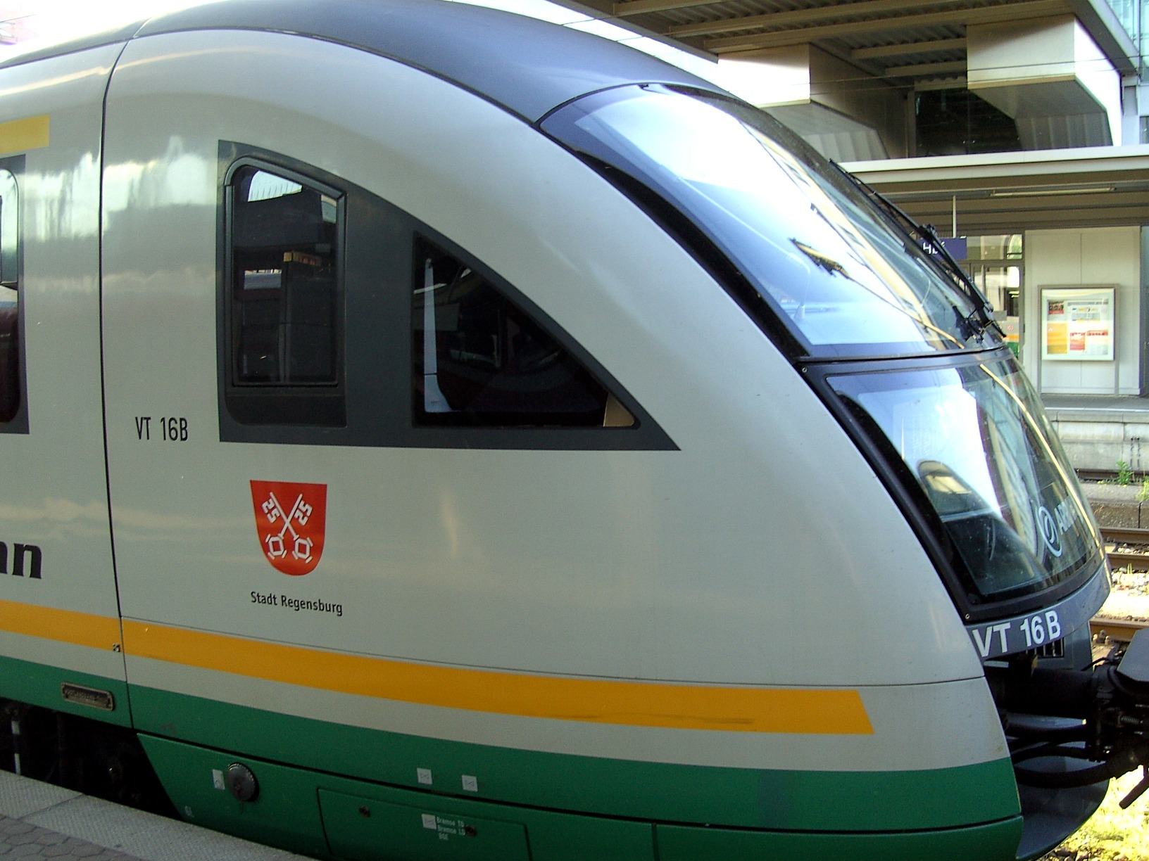 Vogtlandbahn VT 16B (Siemens Desiro) in Regensburg